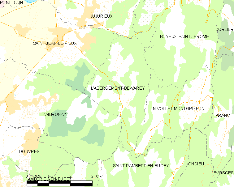 commune française: L'Abergement-de-Varey Map commune FR insee code 01002.png